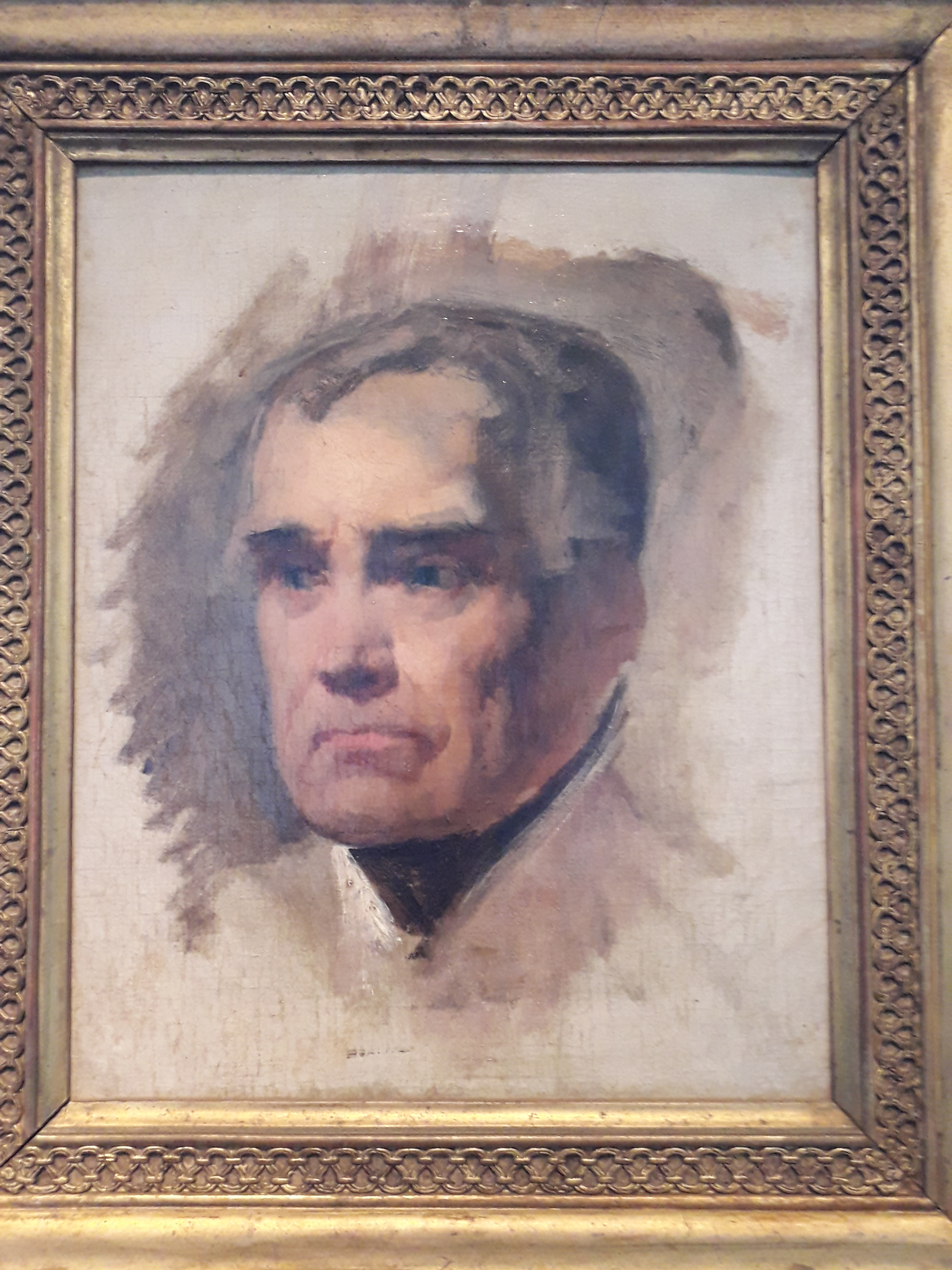 Portrait du général Henri-Gatien Bertrand (1773-1844), maréchal du Premier Empire. Huile sur toile par Emile Jean Horace Vernet. Après 1825. Exposé au Musée Bertrand, à Châteauroux, dans l'Indre, en France. Inv. D4384. Dépôt du Louvre en 1973.